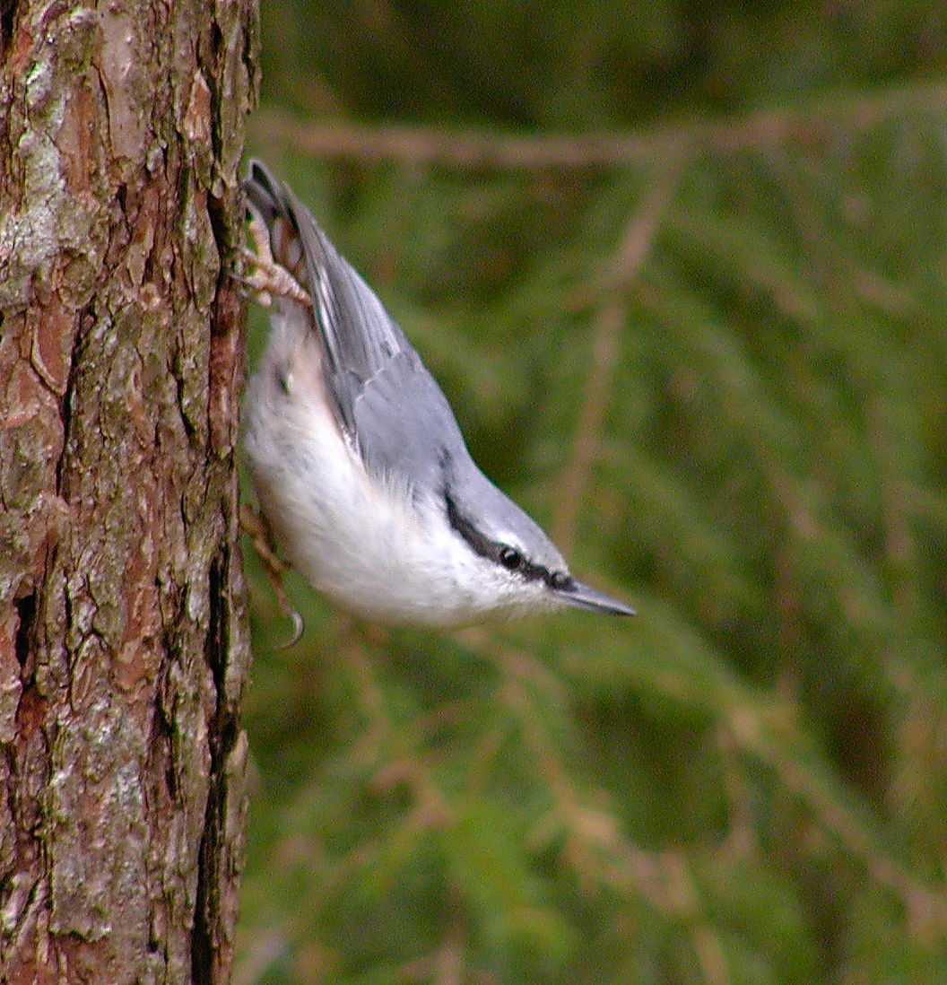 Sitta europaea europaea, Bollebygd, Sweden